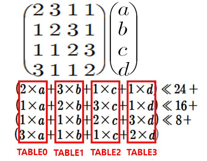 AES 암호화 테이블 생성 방법